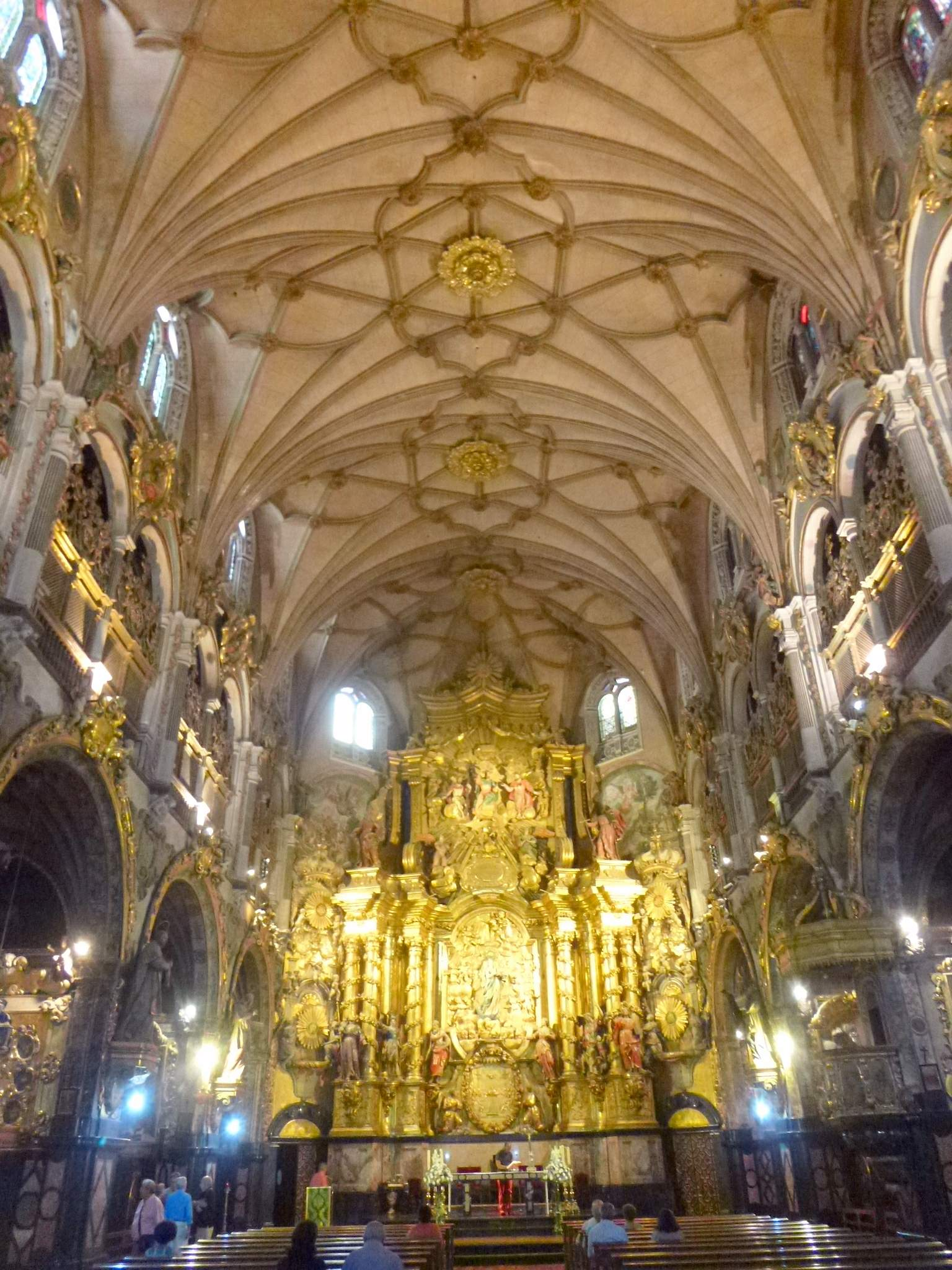 Zaragoza - Iglesia del Seminario de San Carlos